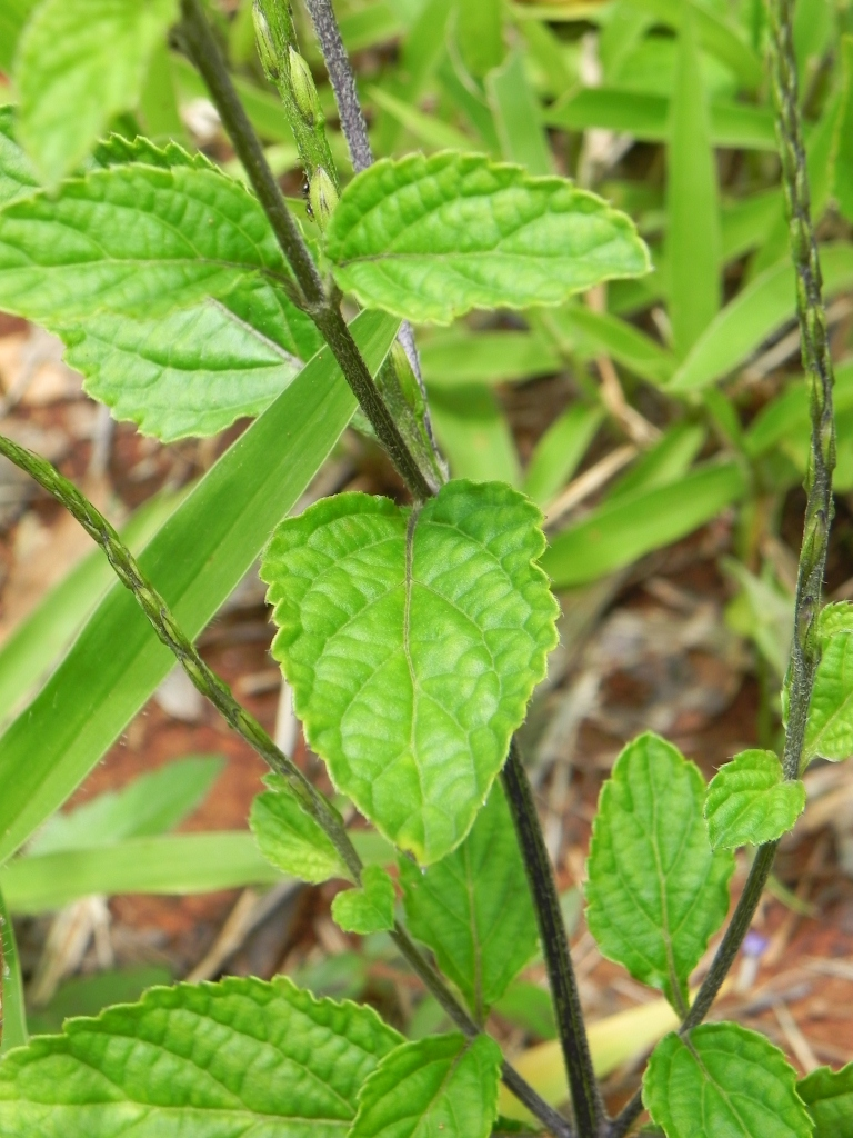 Stachytarpheta cayennensis (Rich.) Vahl - VERBENACEAE - Parque Olhos D'Água - Brasília - Distrito Federal - Brasil.